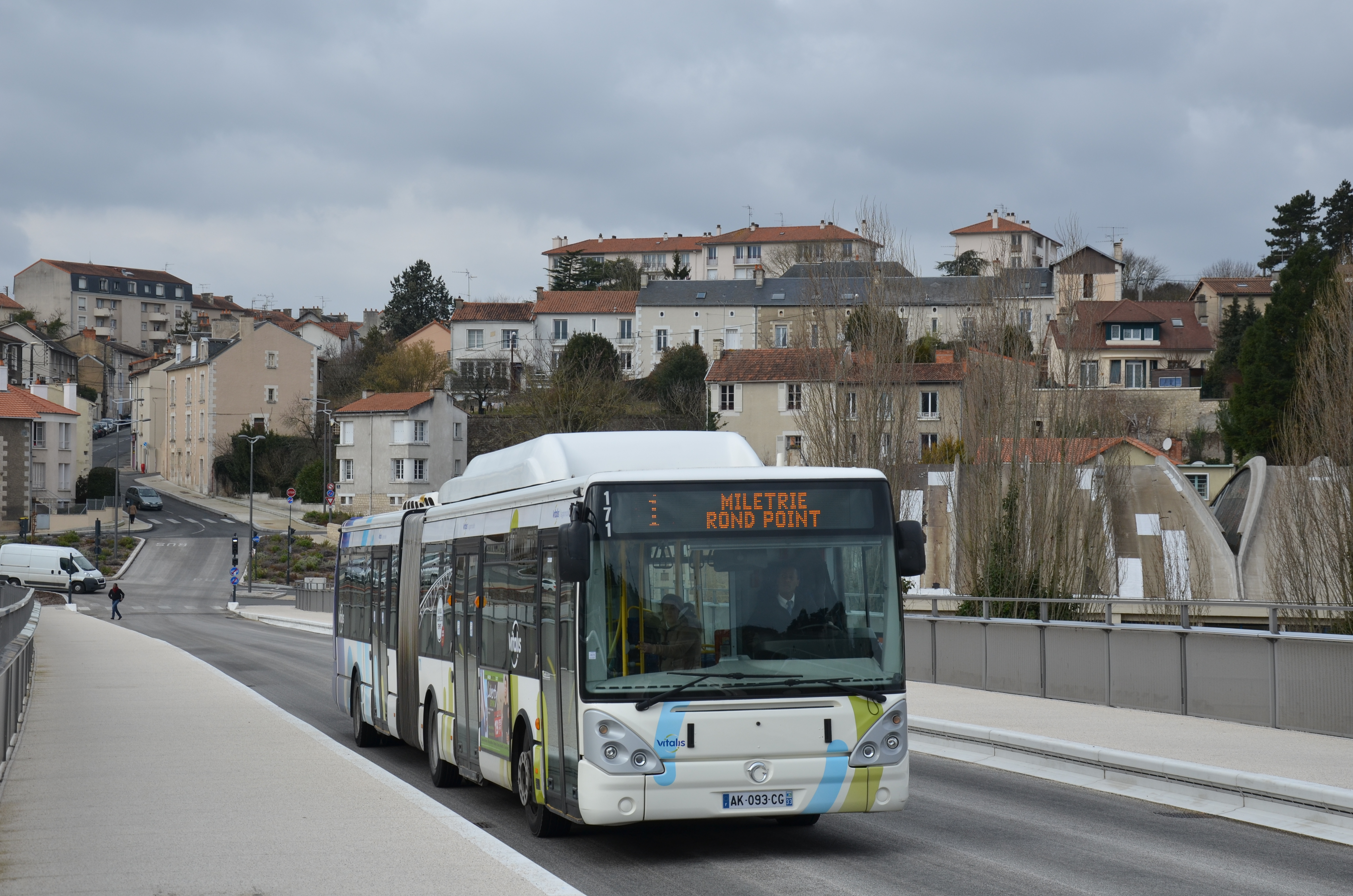 Irisbus Citelis 18 n°171 de la ligne 1 du réseau VITALIS de Poitiers, près de l'arrêt Gare SNCF (Léon Blum).